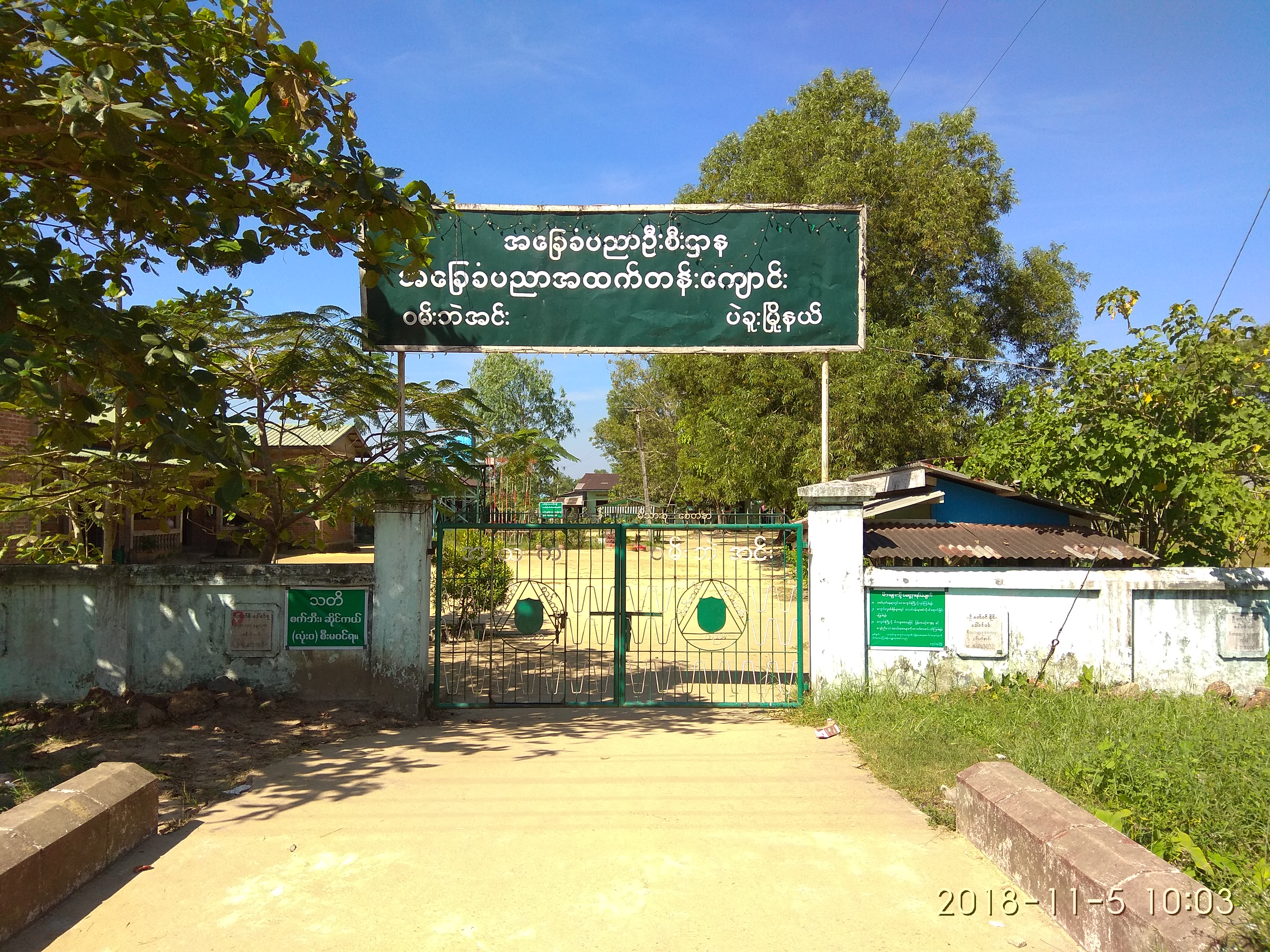 မြန်မာဘာသာ: အထက - ဝမ်းဘဲအင်း (အဝင်)